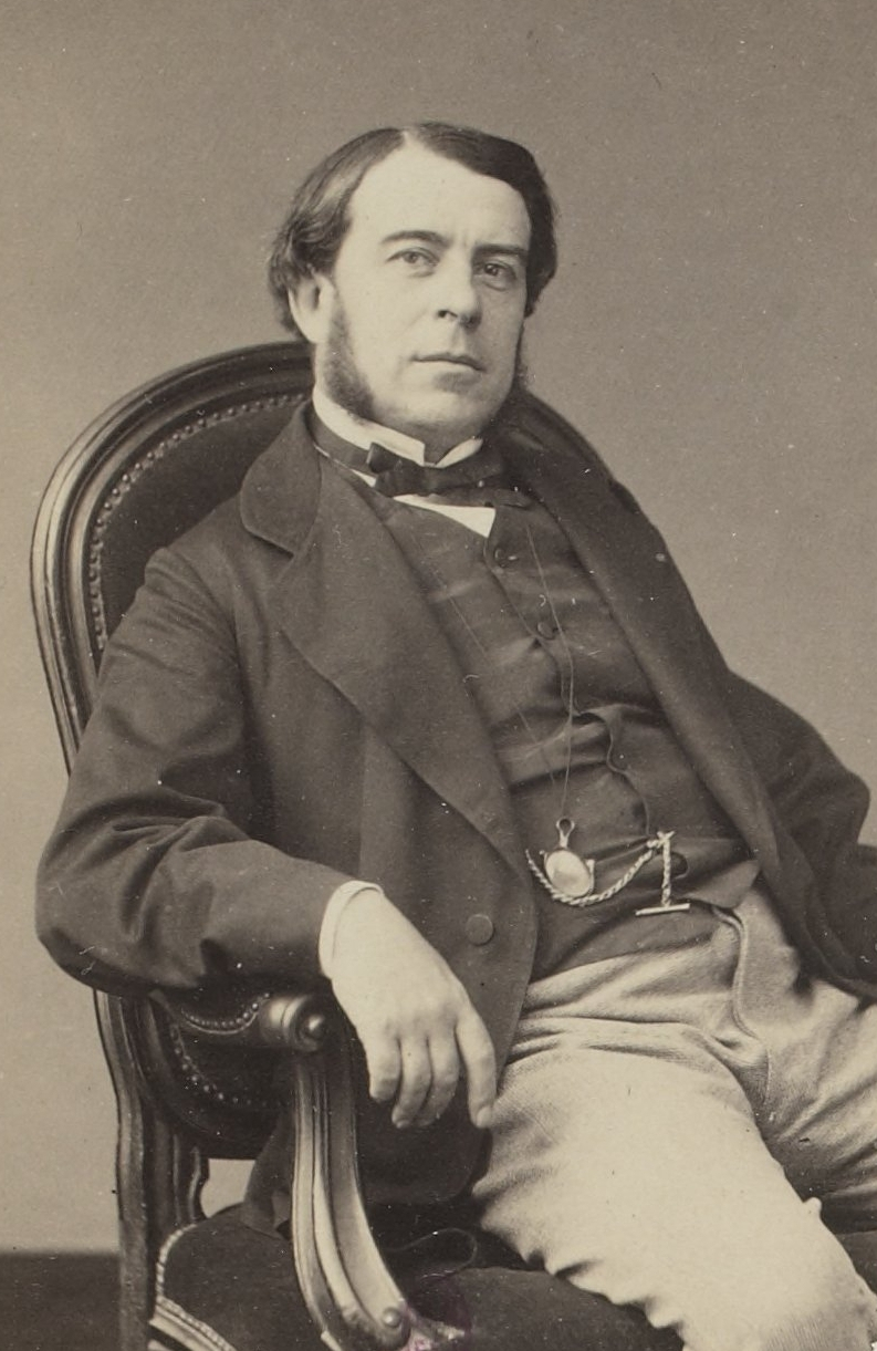 Personnalités françaises et étrangères sous le Second Empire.